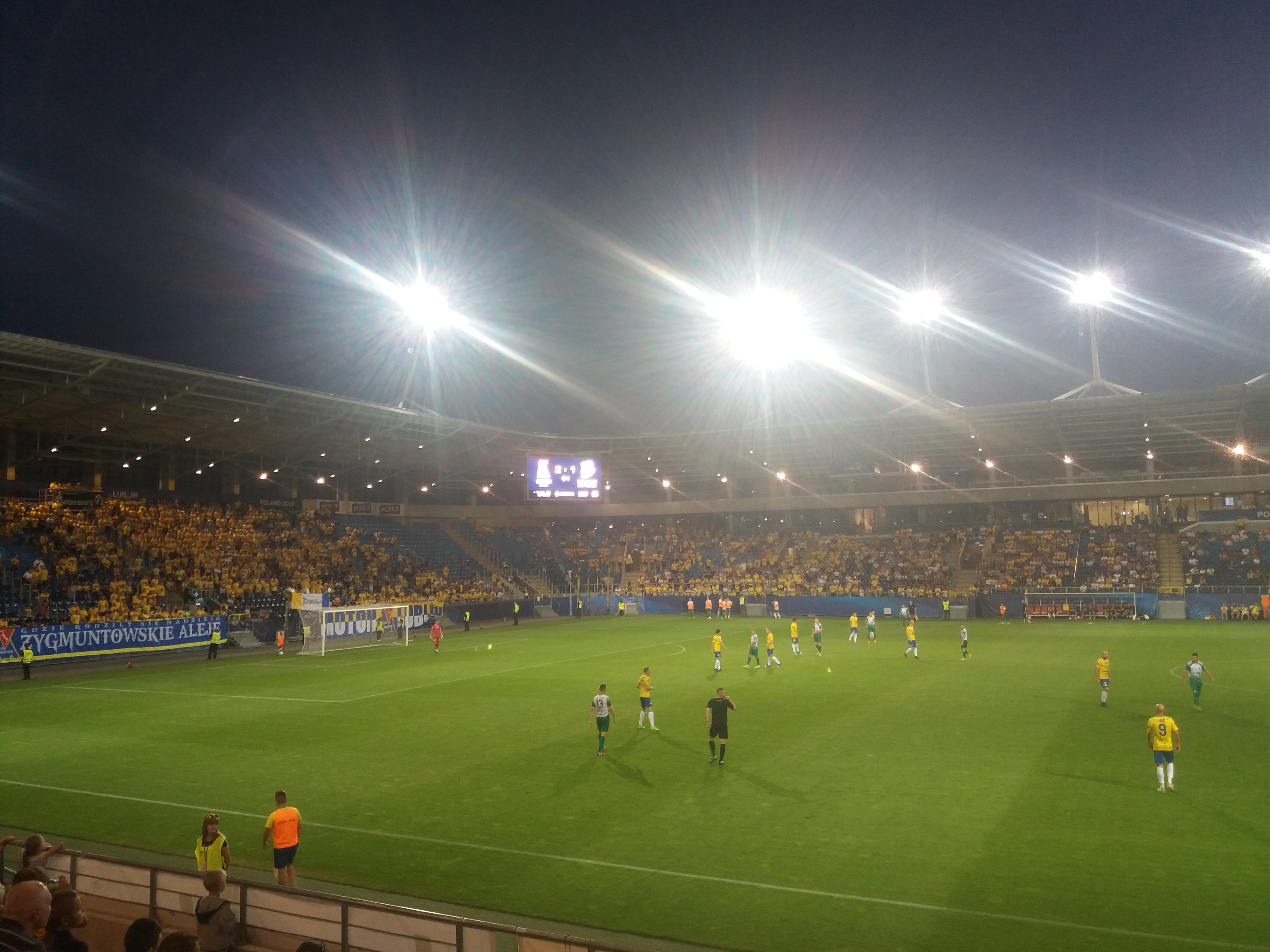 Motor Lublin - Podlasie Biała Podlaska 16 sierpnia 2017